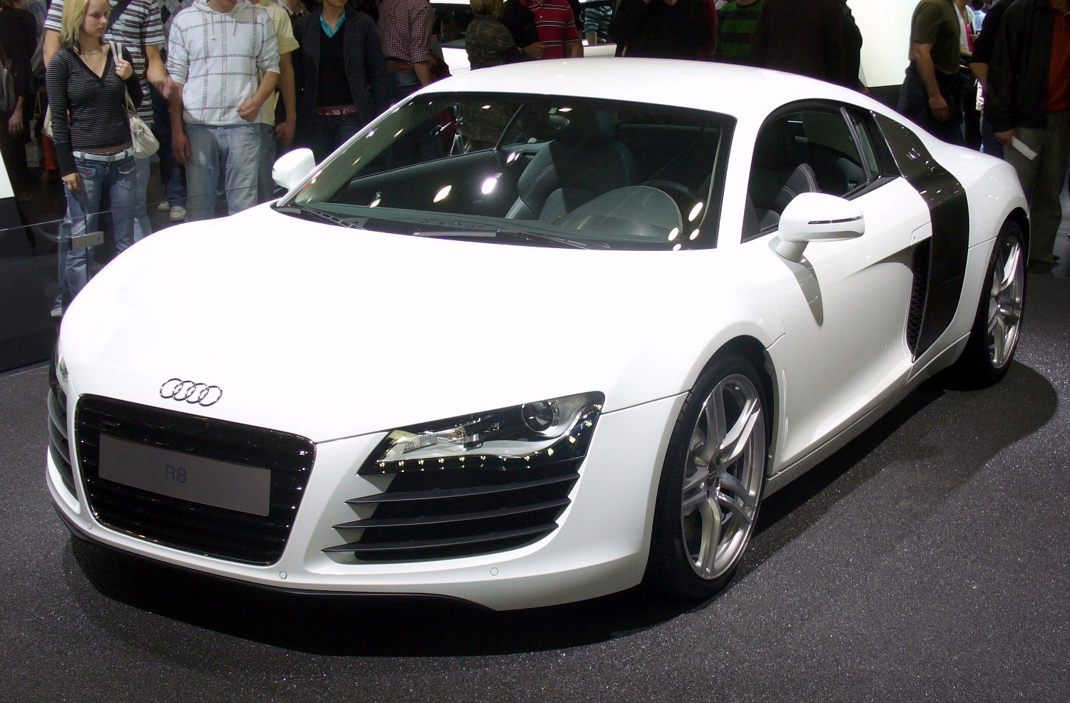 Audi R8